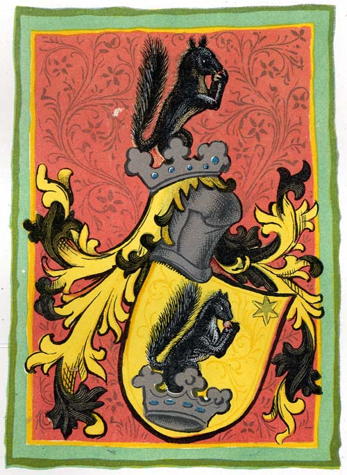 A Berényi Kakas család címere, amelyet 1431. március 12-én kaptak Zsigmond magyar királytól Nürnbergben